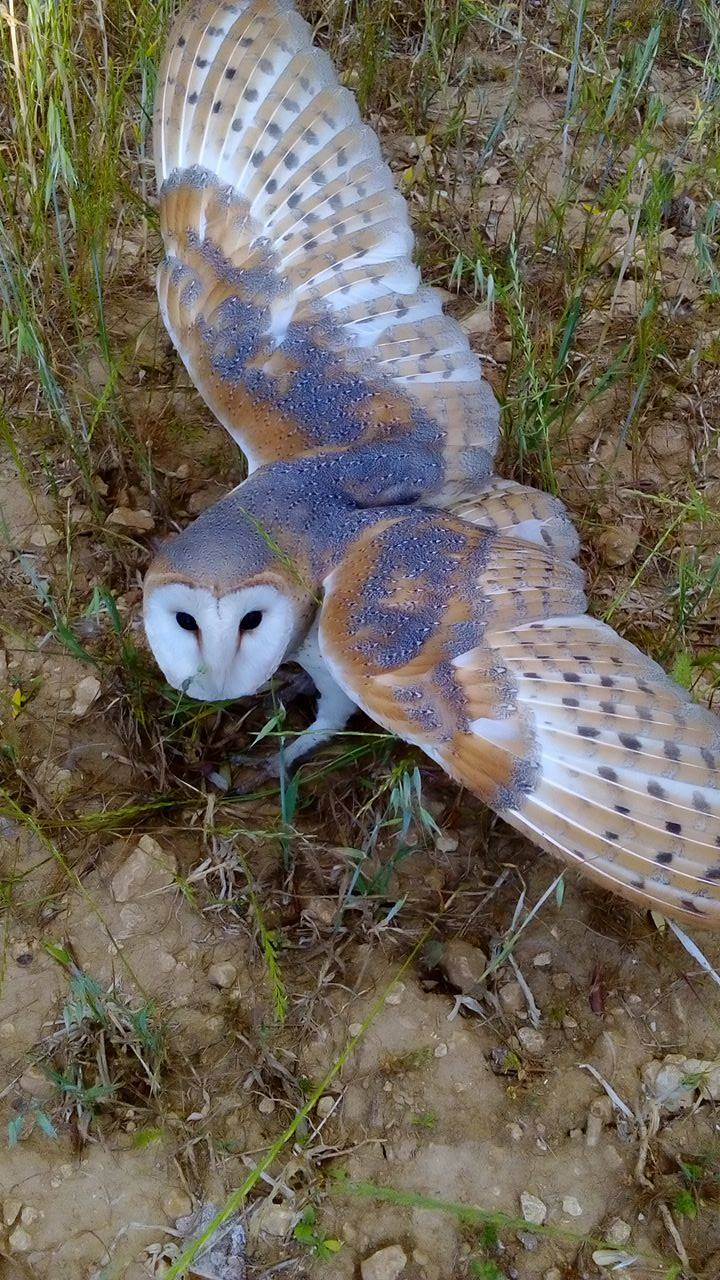 Κουκουβάγια τυτώ This is a photography of Natura 2000 protected area with ID GR2220002